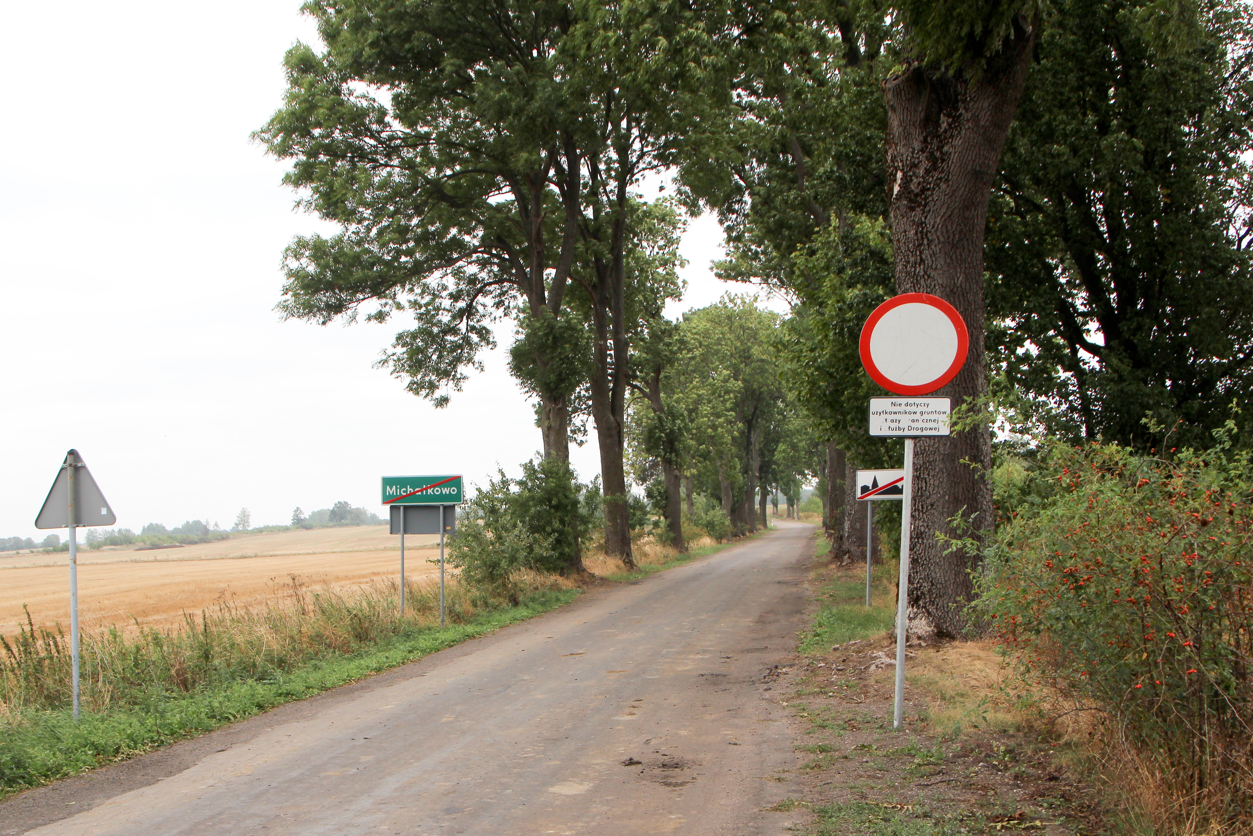 Michałkowo - wieś w Polsce położona w województwie warmińsko-mazurskim, w powiecie kętrzyńskim, w gminie Barciany.